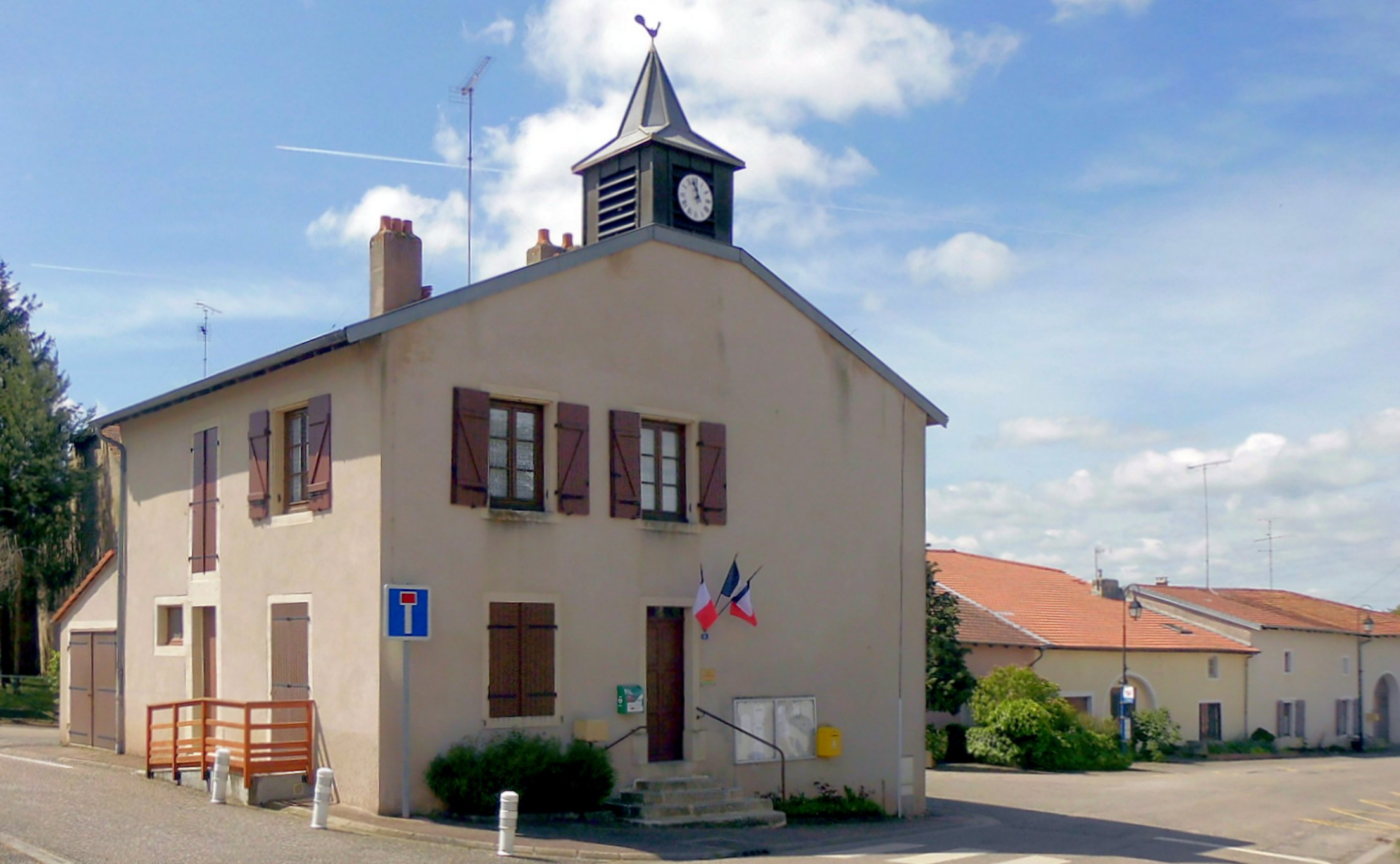 La mairie de Quevilloncourt